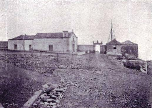 "Egreja de Nossa Senhora da Conceição da Rocha e Casa do Castello" in CABRAL, Júlio. "A Imprensa em Santa Maria", apud Álbum Açoriano, fascículo nº 37, 1903. pp. 293-295.